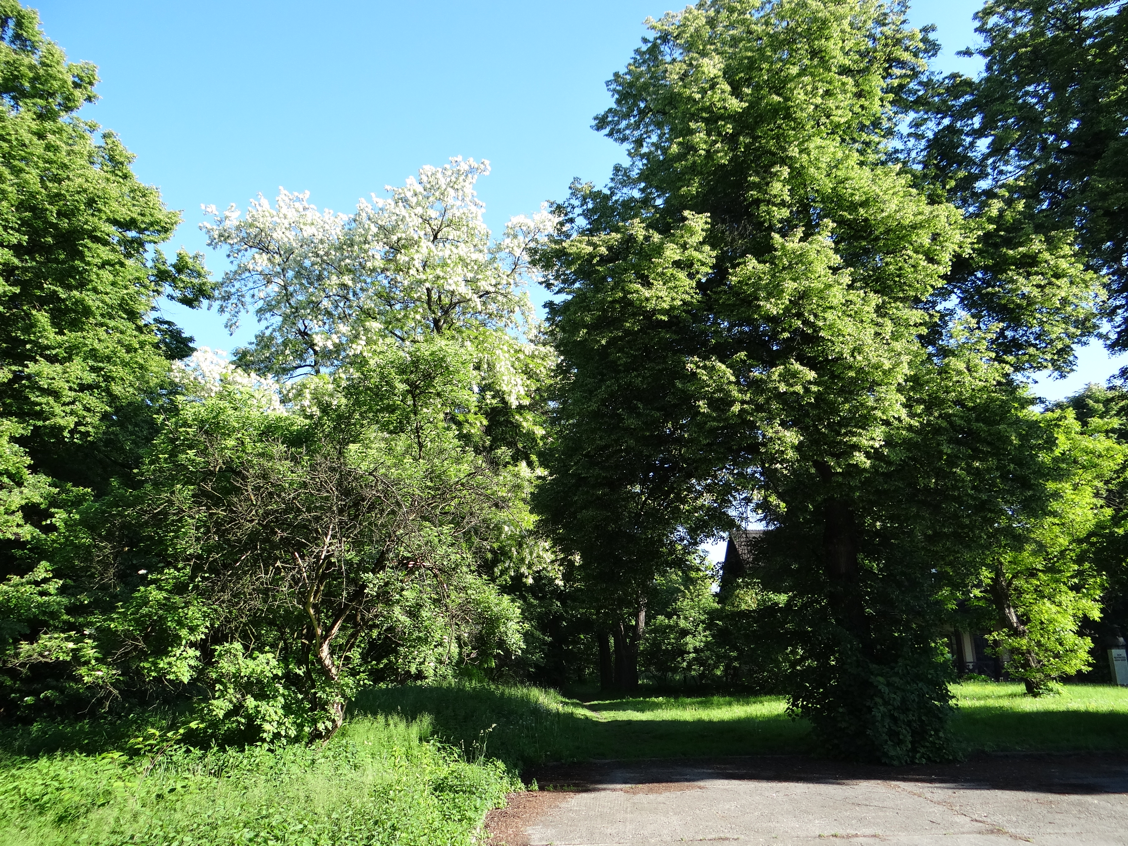 Kraków, ul. Wańkowicza 25, park, XIX